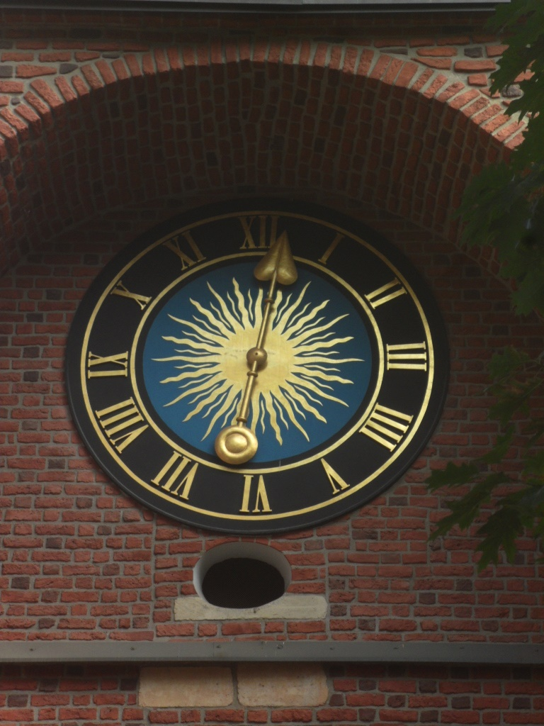 Kließelseeger heißt in Breslau die Uhr der Barbarakirche (heute Kathedrale der Geburt der seligen Jungfrau Maria), die als erste schlägt. Wenn sie schlug, wurden die Klöße eingelegt. Schläsch: Kließelseeger heeßt ei Brassel de Seeger der Barbrakerche, de ols erschte schlägt. Wenn se schlug, wurda de Kließel/Kließla eengeleit.